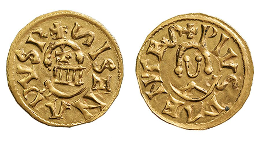 Reproducció d'un tremís de Sisenand, en or. Ceca de Mentesa.